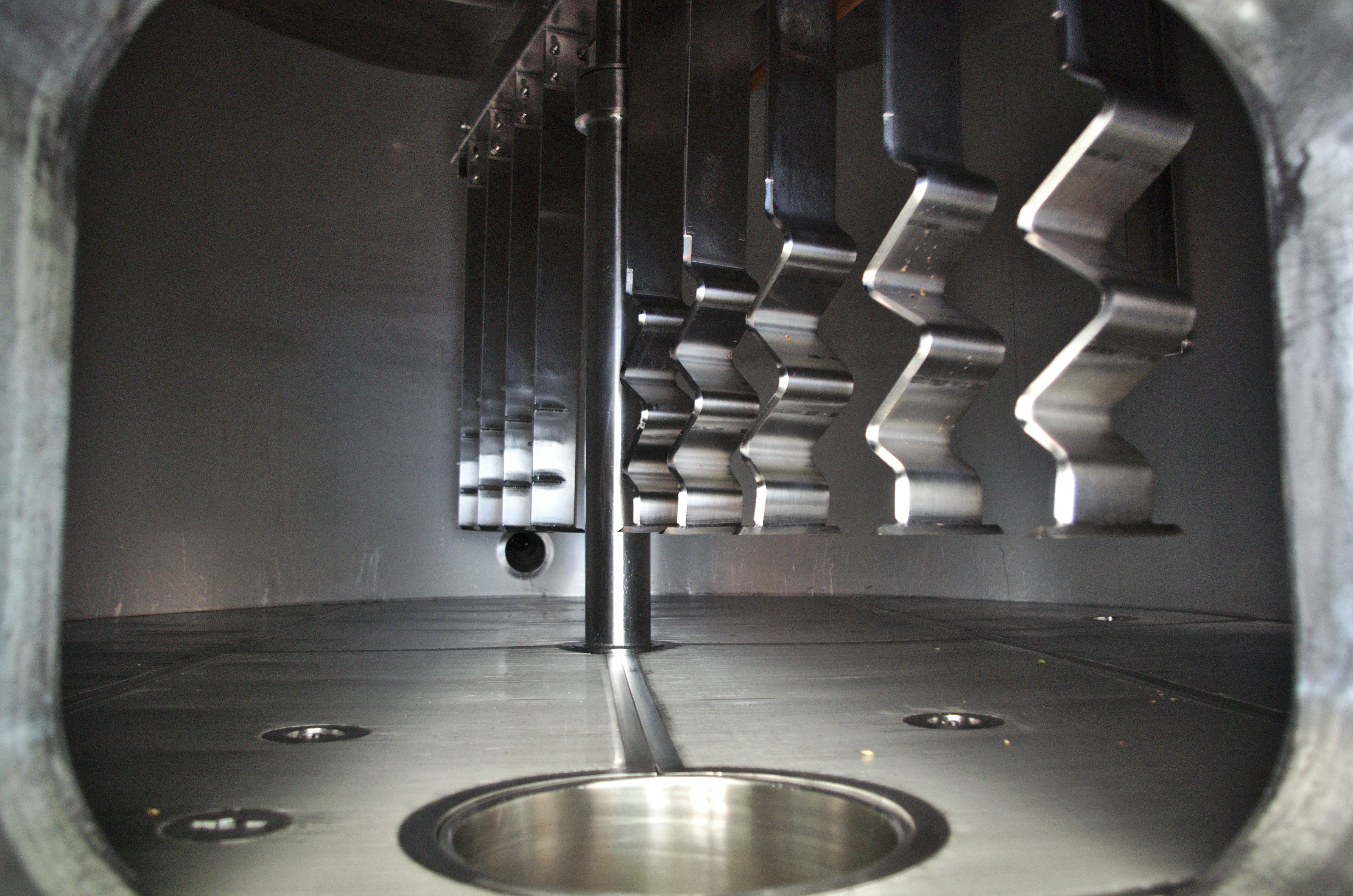 Brasserie Ratz - 20140926 - Läuterbottich